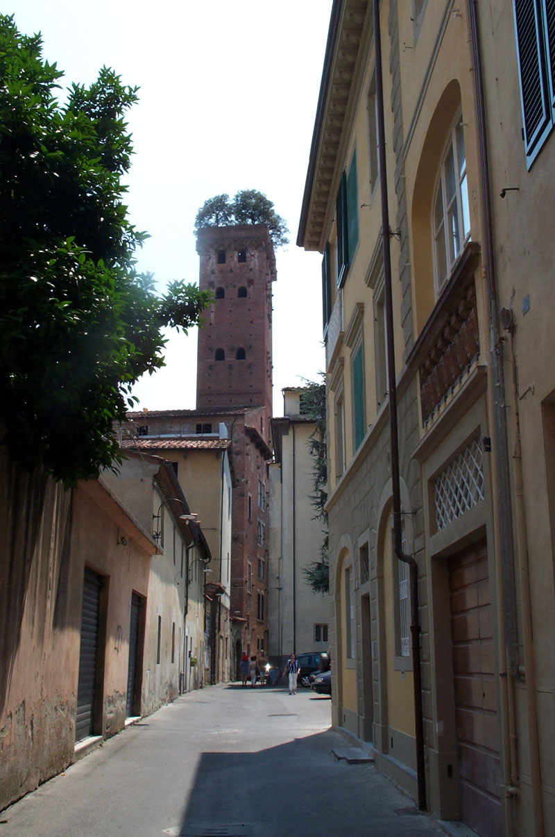 Tour Guinigi à Lucques en Toscane (Italie)